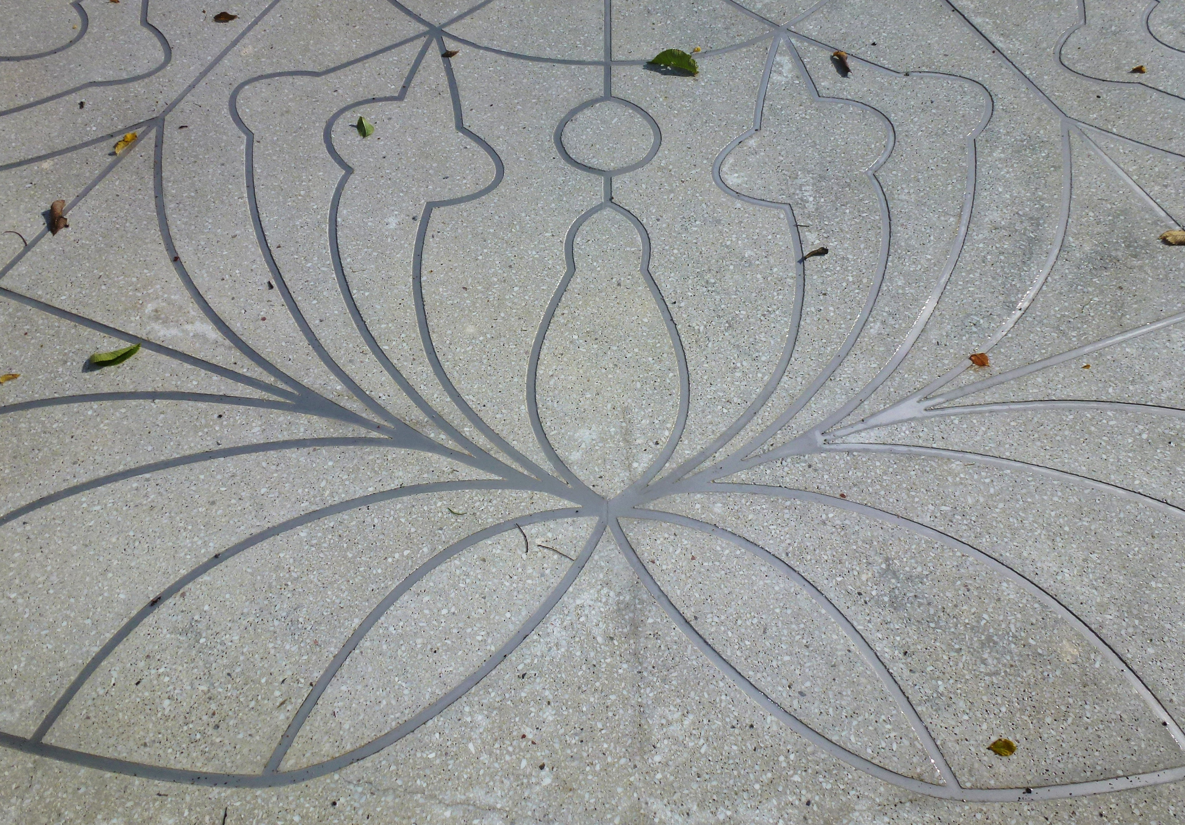 Monument "Restare" på Djurgården, skapad av Monika Larsen Dennis